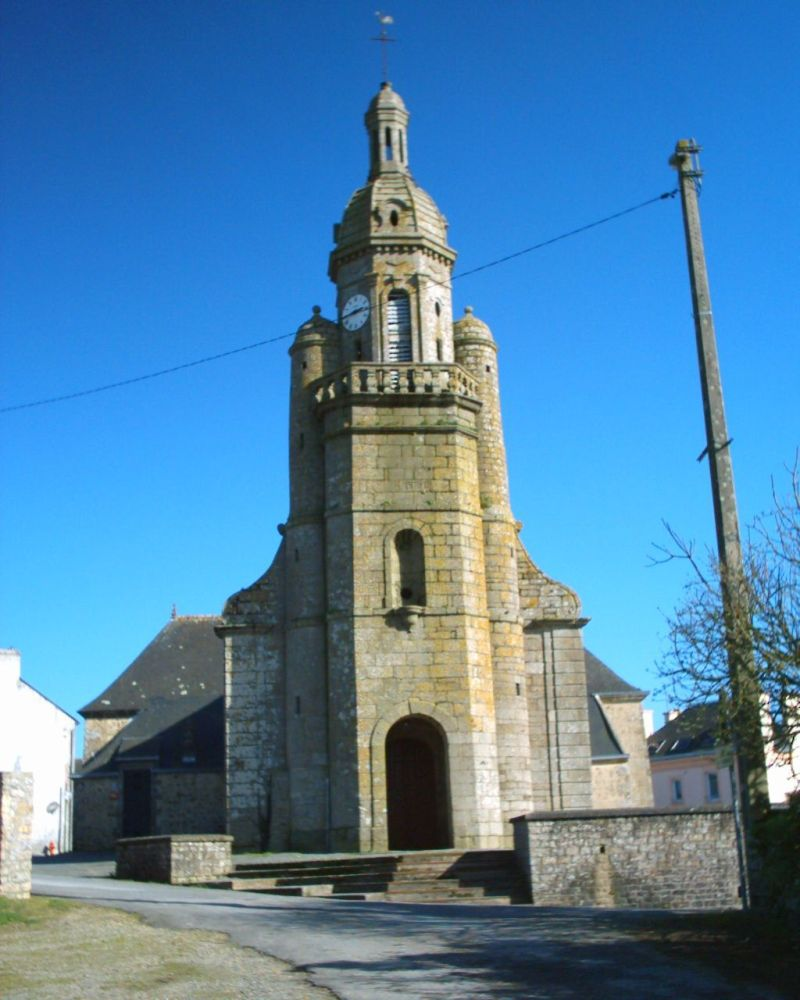 Façade et entrée principale de l'église